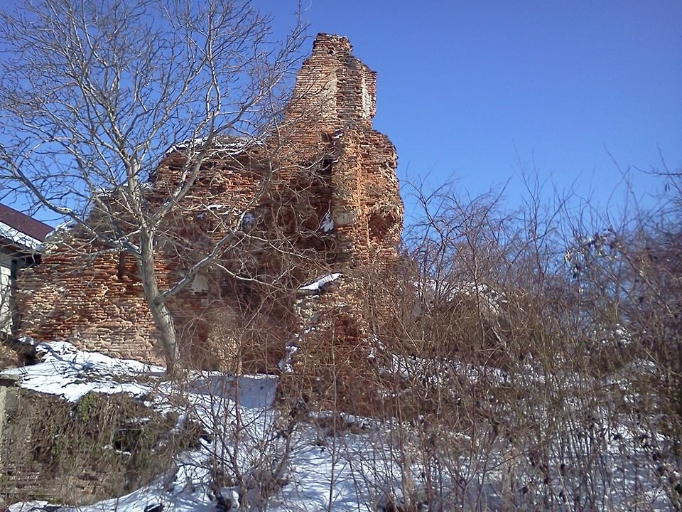 Ruinele conacului Drăghici Cantacuzino